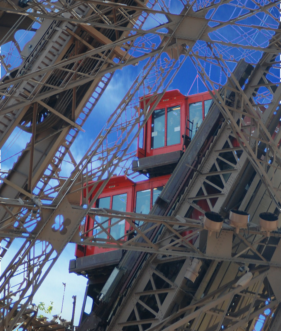 Torre Eiffel. Elevador del pilar norte